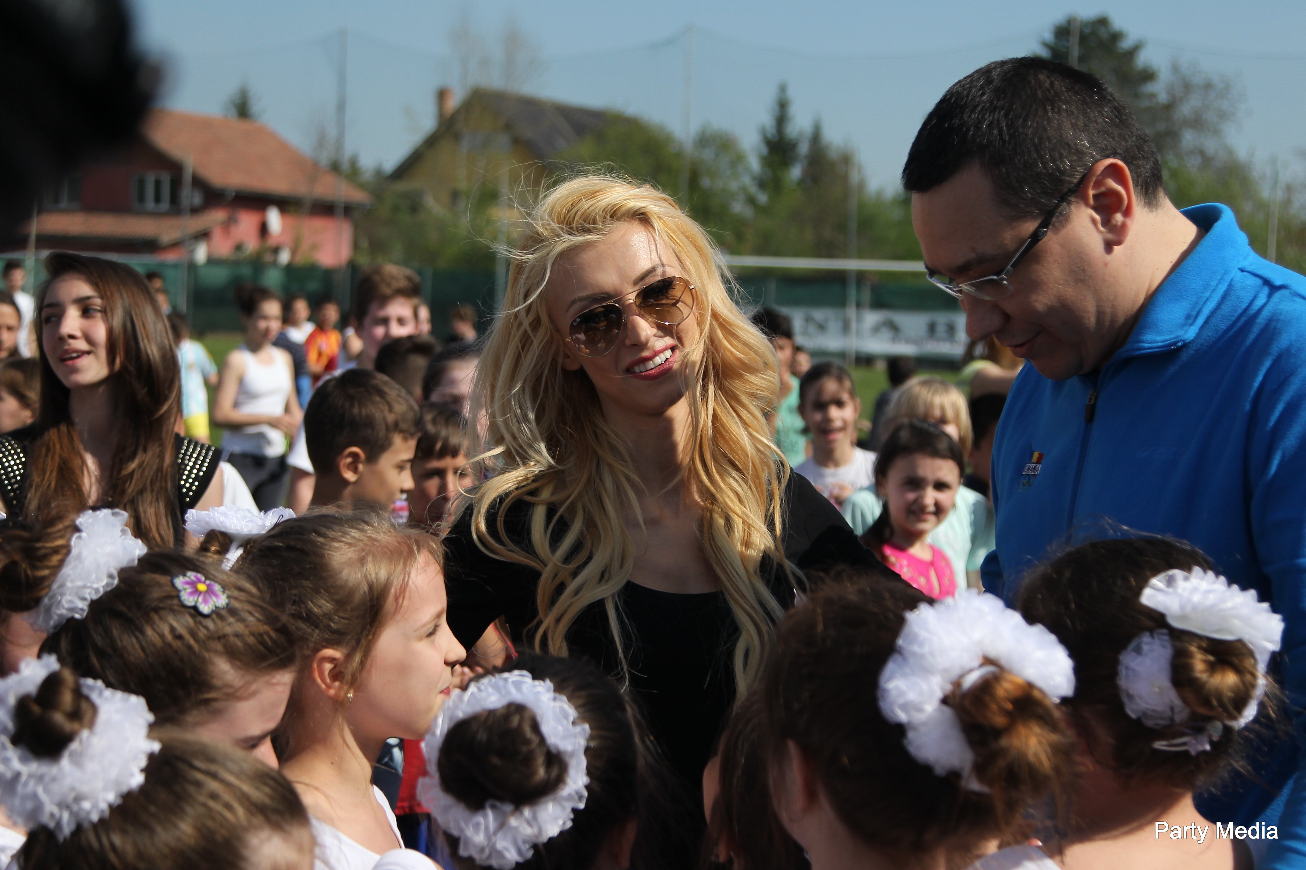 Evenimentul Miscarea inseamna viata - Scoala Altfel, Buftea-35